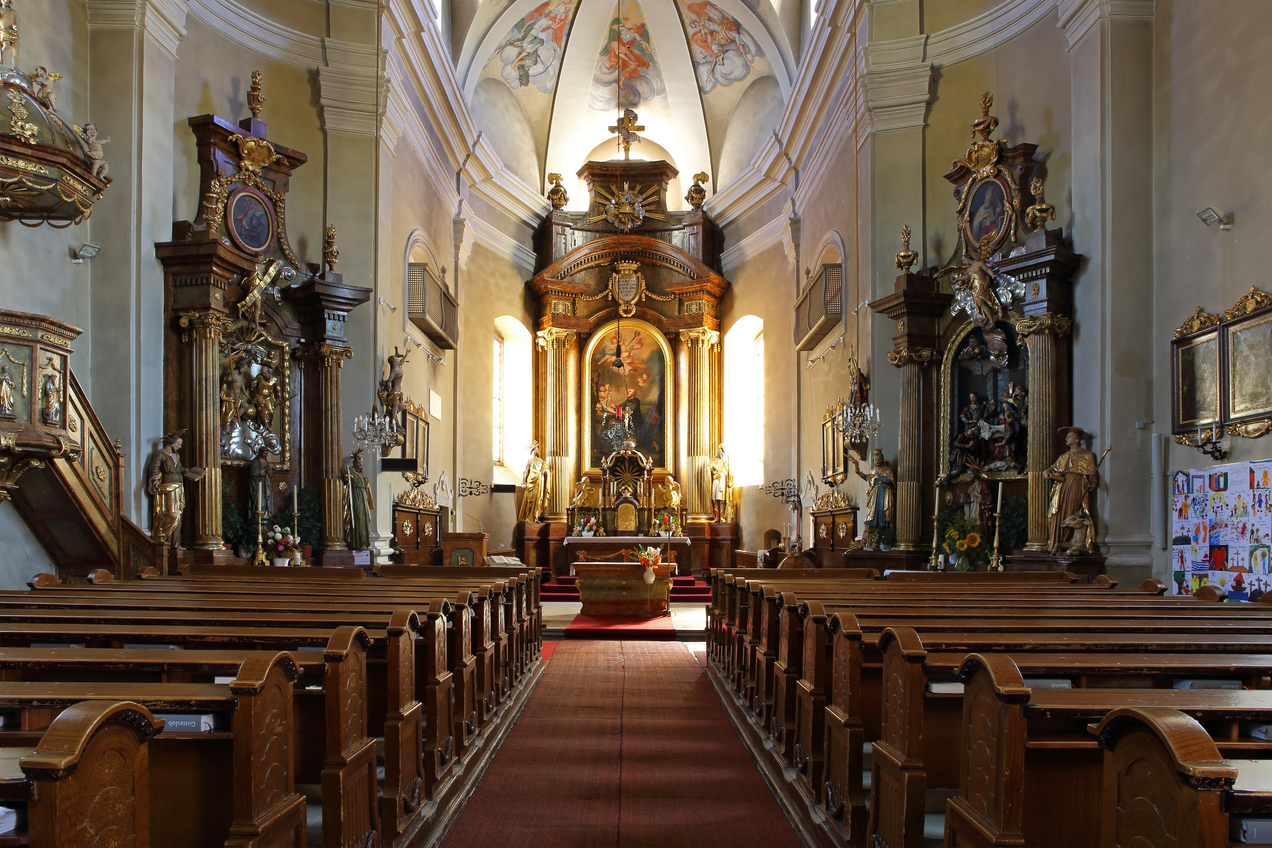 Pfarrkirche hl Ägydius in Arbesbach - Innen